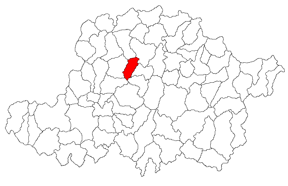 Volapük: Topam in ziläk: Arad.